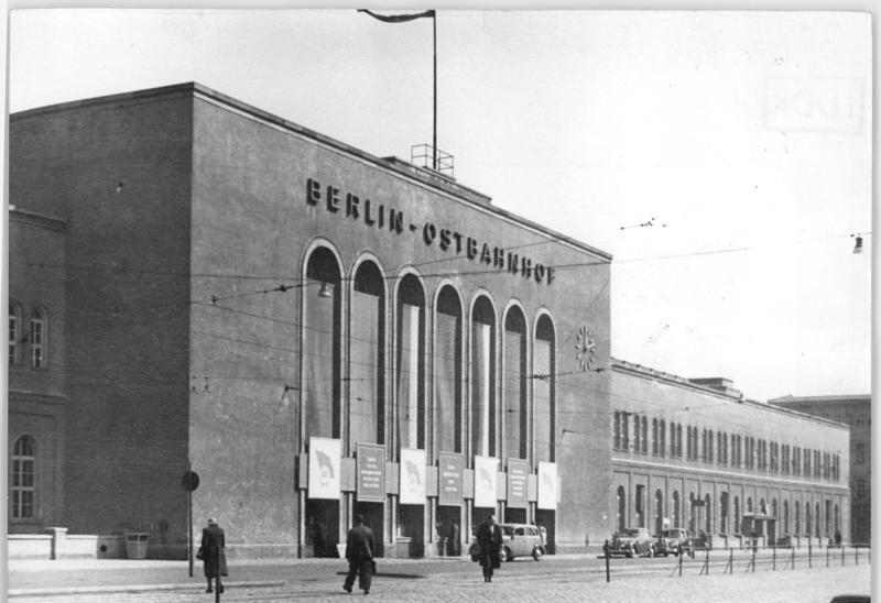 Zentralbild-Funck Mü-Ho. 7.4.1954 Berlin 1954 Ostbahnhof, Hauptportal. (Stand vom 3.4.1954)